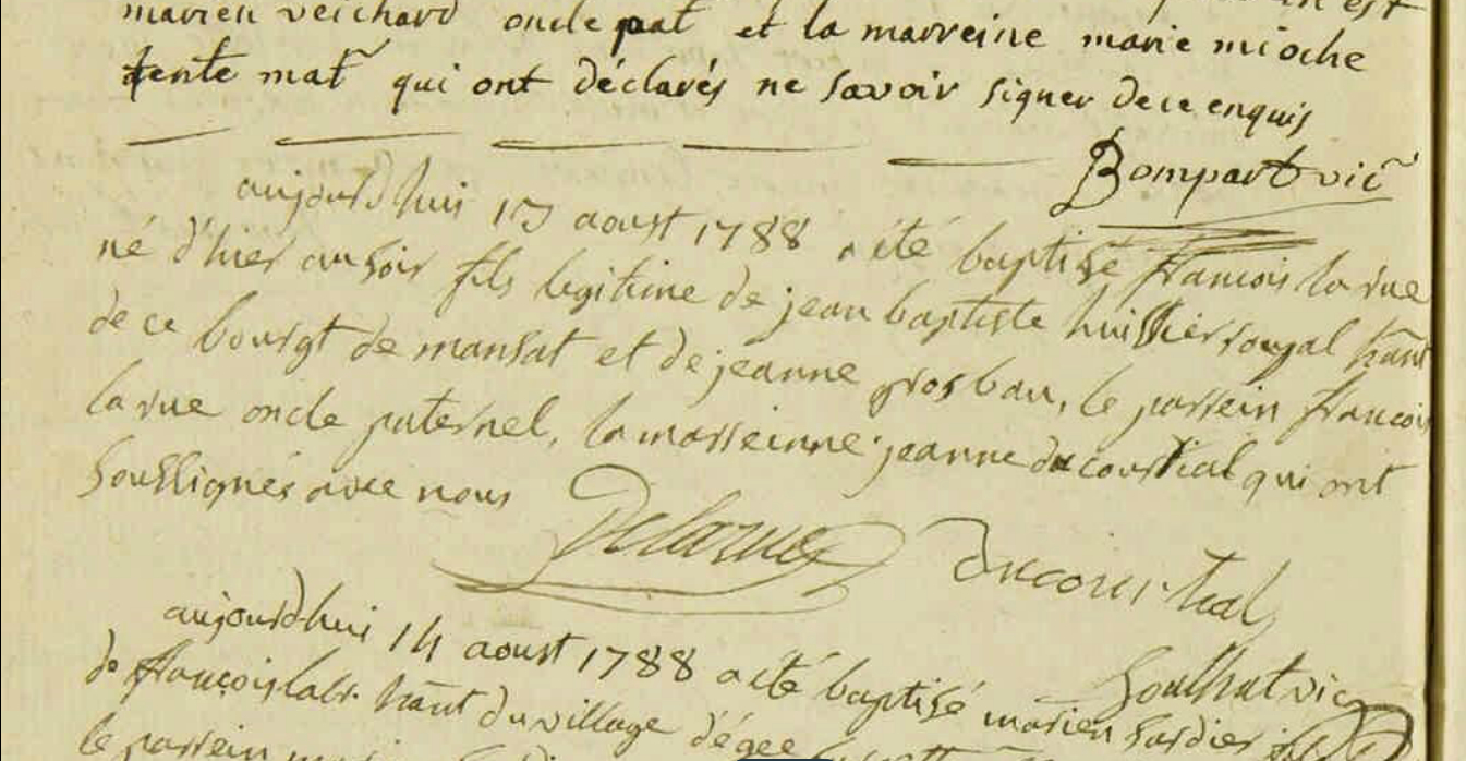 Reproduction de l'acte de naissance de François Delarue.